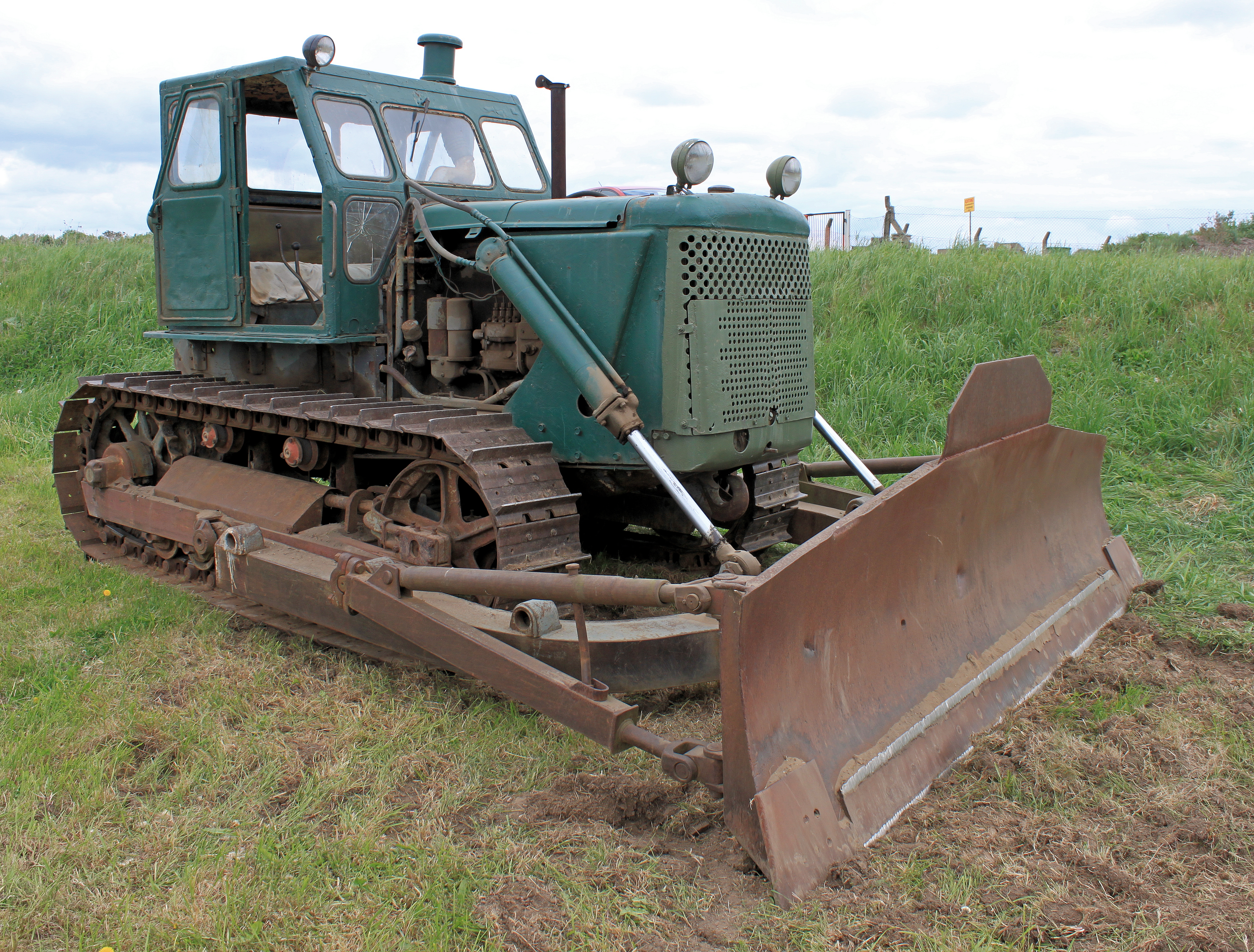 T100-MGP mit Planiereinrichtung D493A